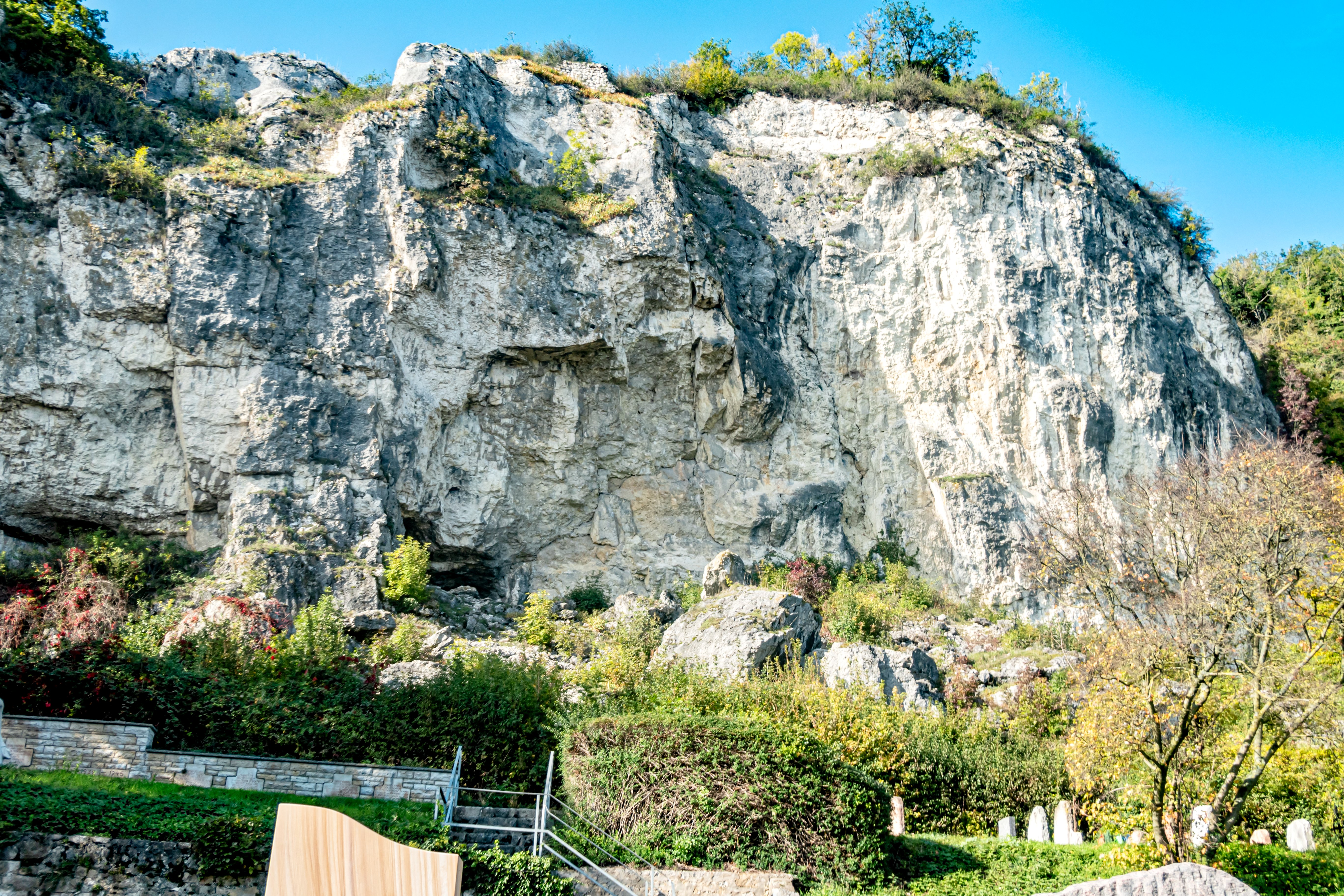 Bilder vom Isteiner Klotz am 20. 10. 2019